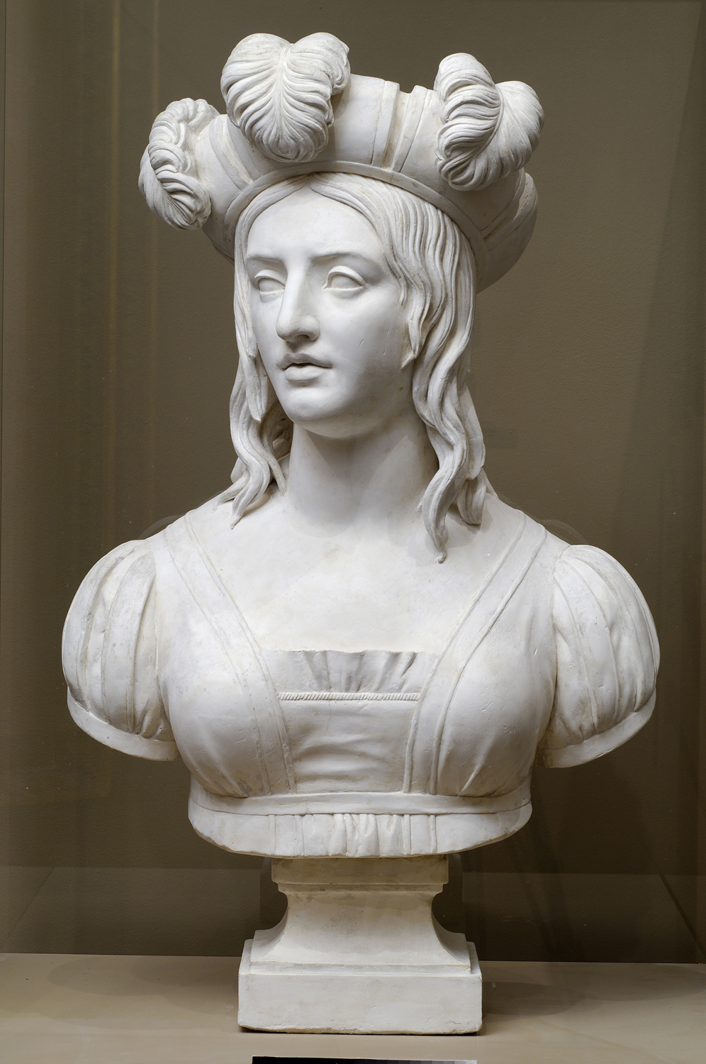 Sculpture